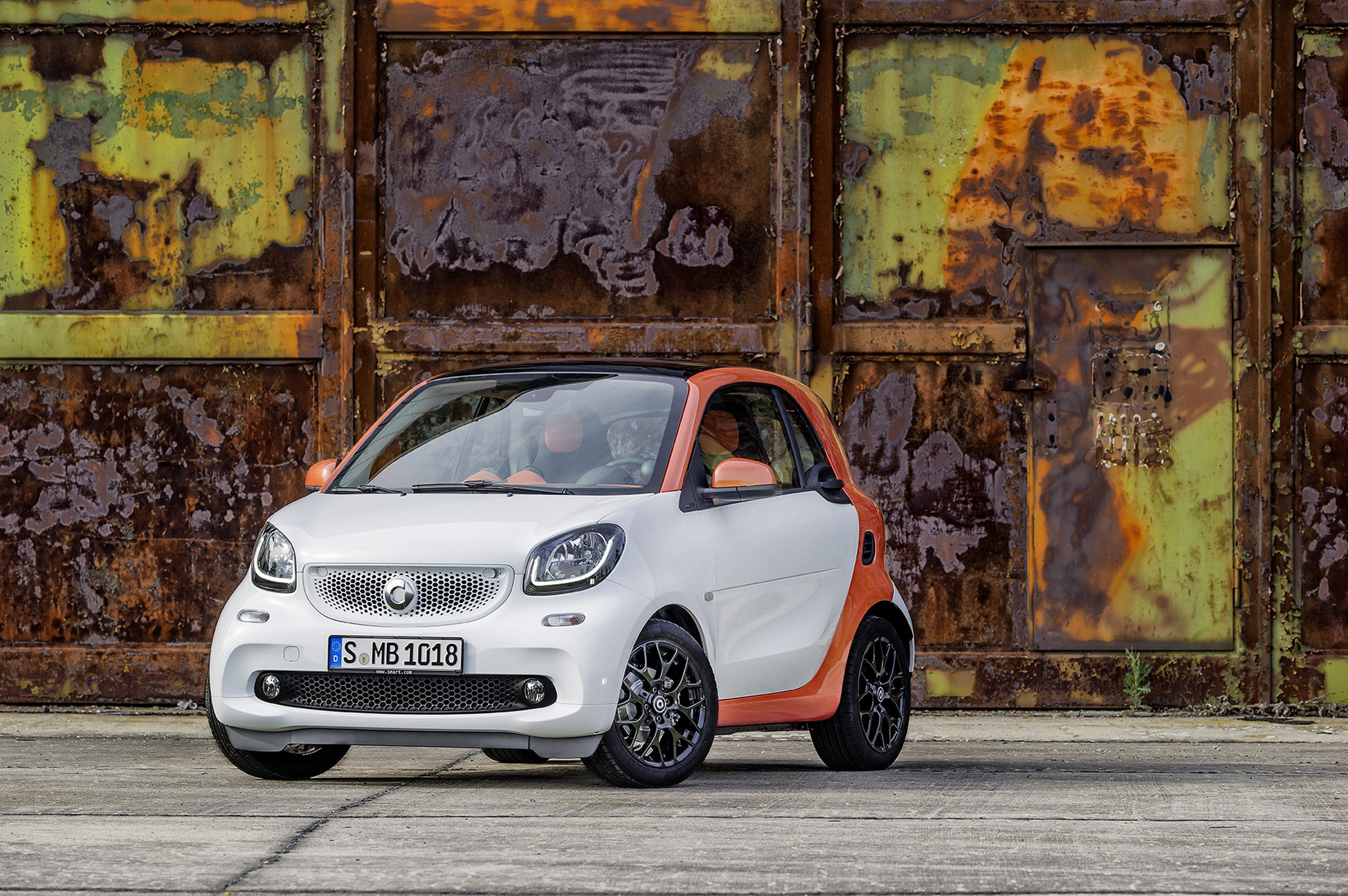 Pressefotos von Smart